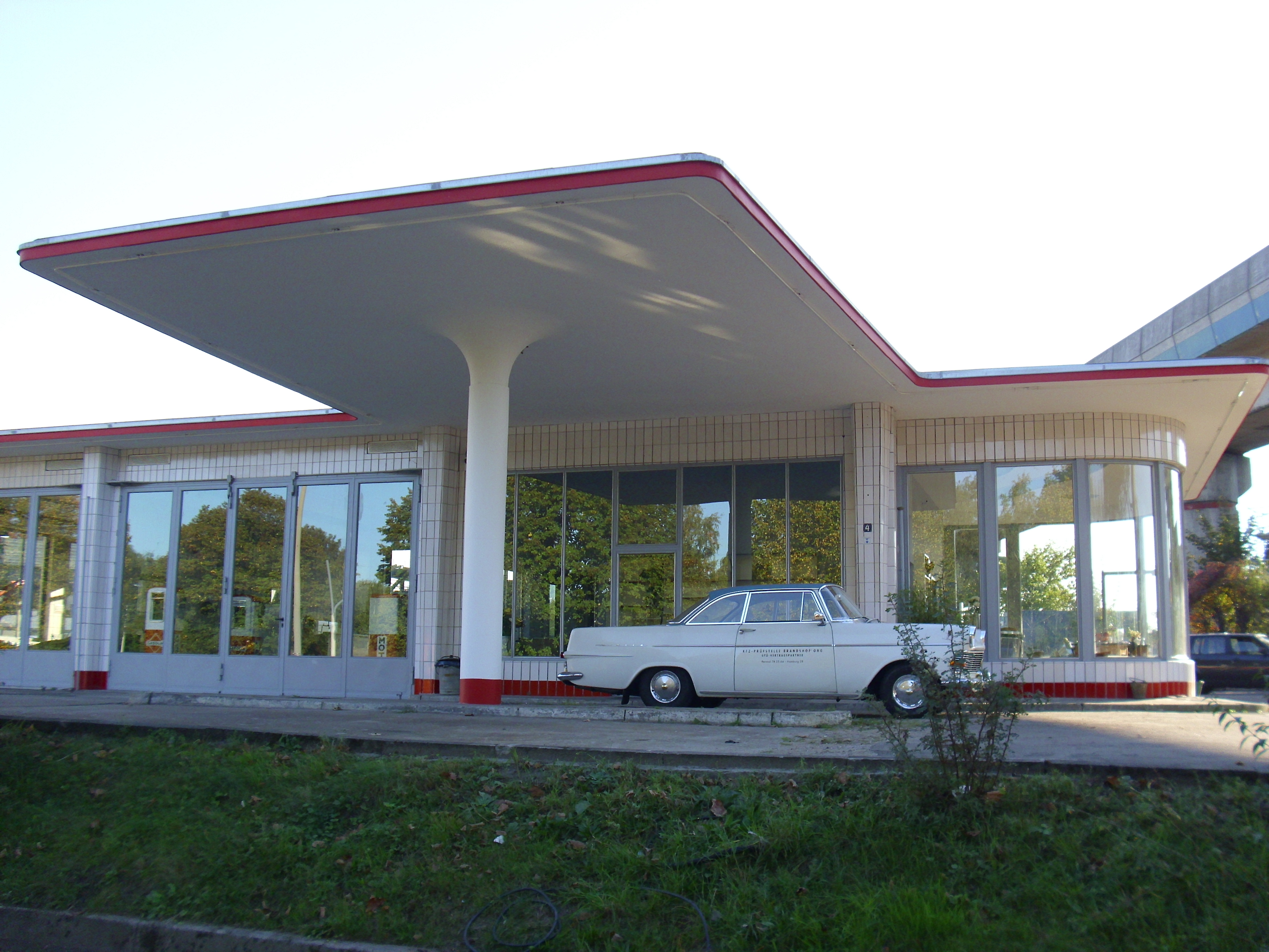 Tankstelle Billhorner Röhrendamm 4 This is a photograph of an architectural monument.